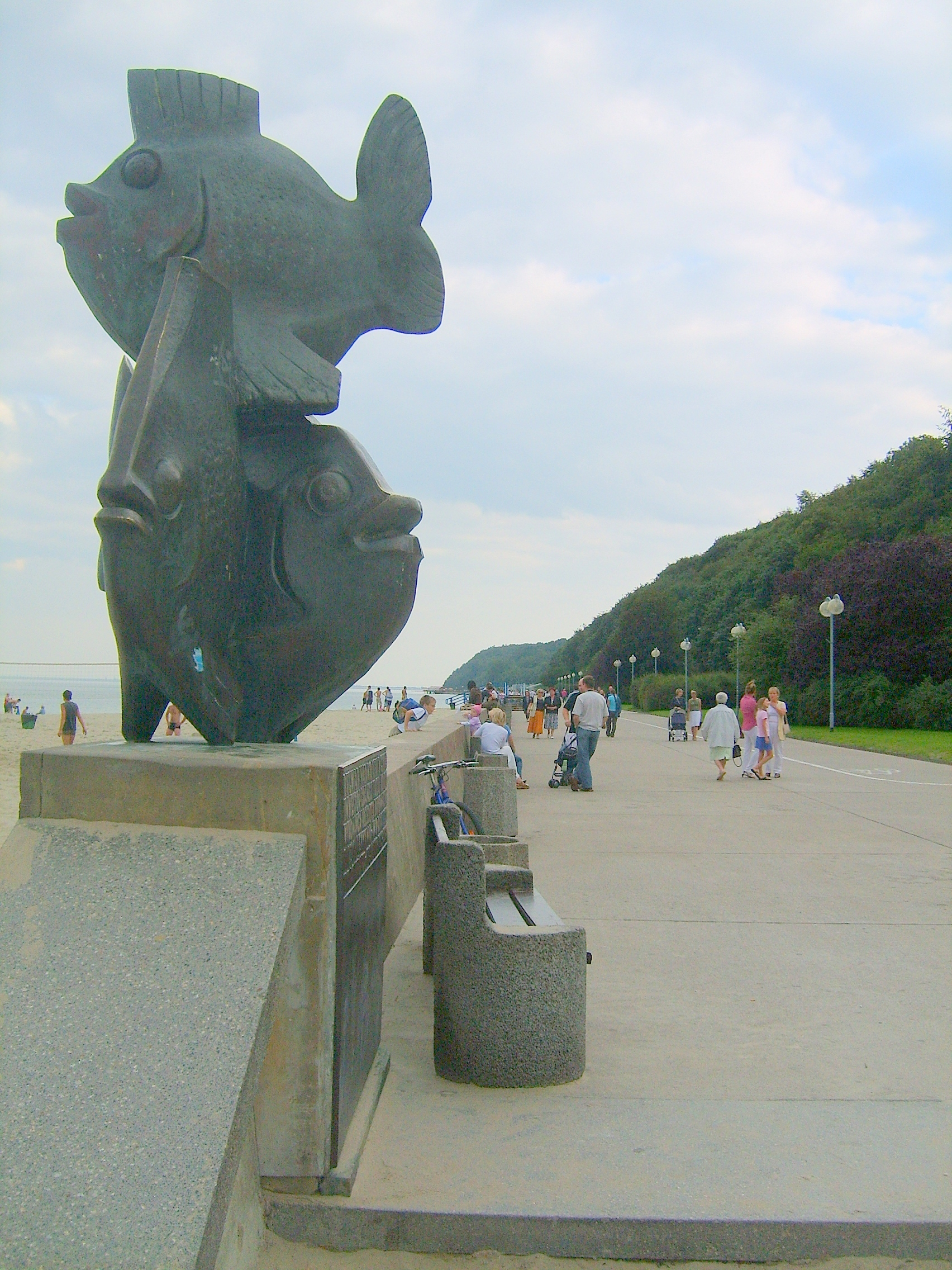 Bulwar Nadmorski, początek bulwaru przy "rybkach".